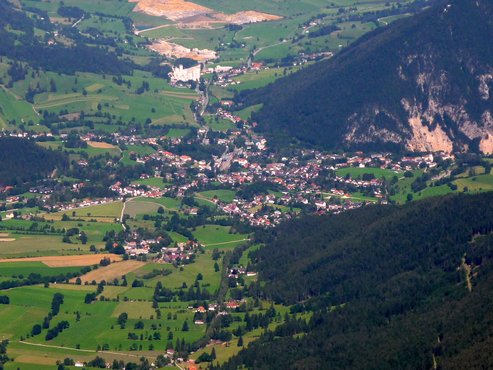 Das Bild zeigt das Ortsgebiet Puchberg am Schneeberg mit den beiden Pforten und dem Himberg rechts hinten. Außerdem sind die Gipswerke im Hintergrund zu sehen. Das Bild wurde vom Schneeberg aus fotographiert.